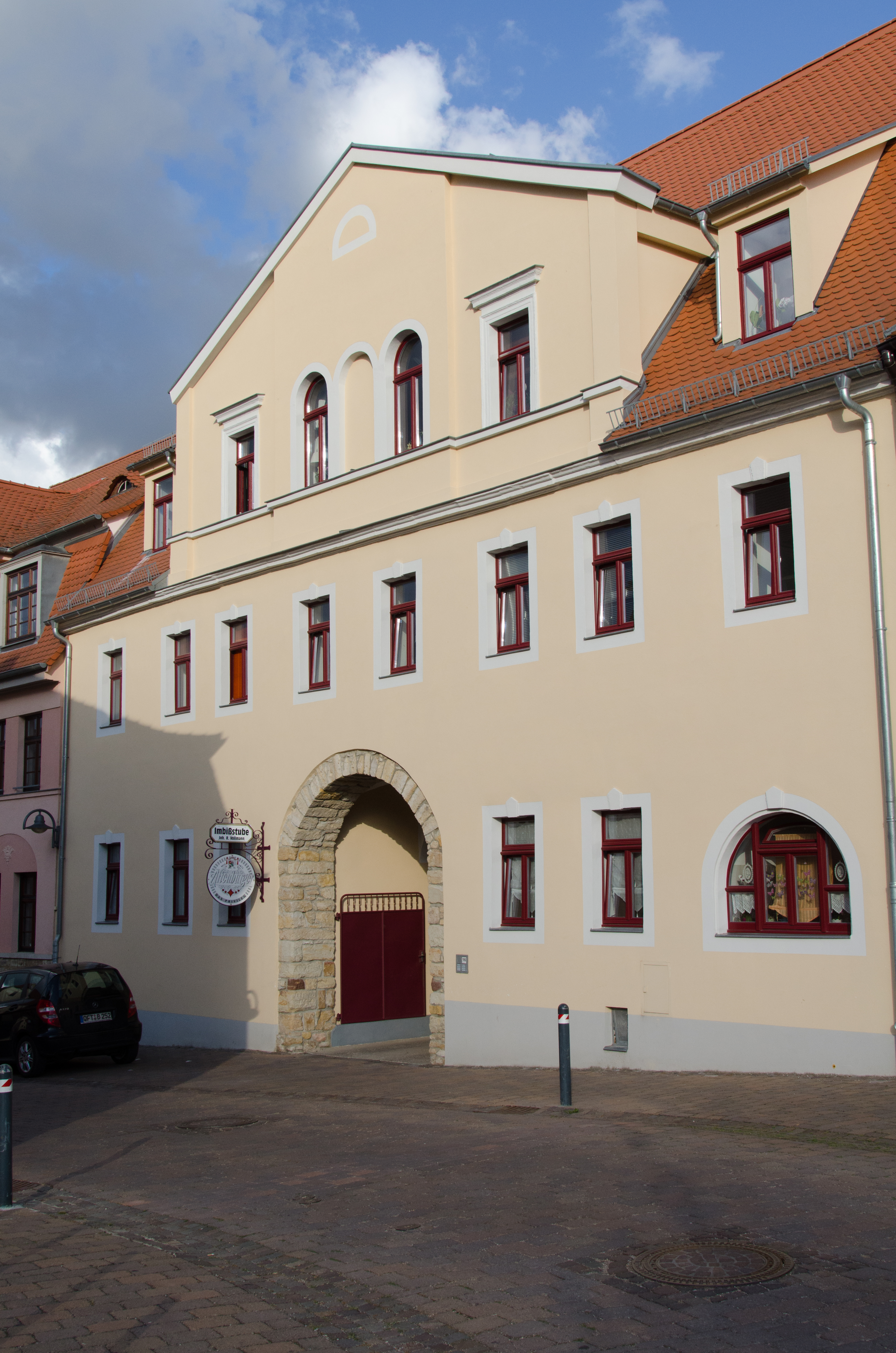 Querfurt, Klippe 16